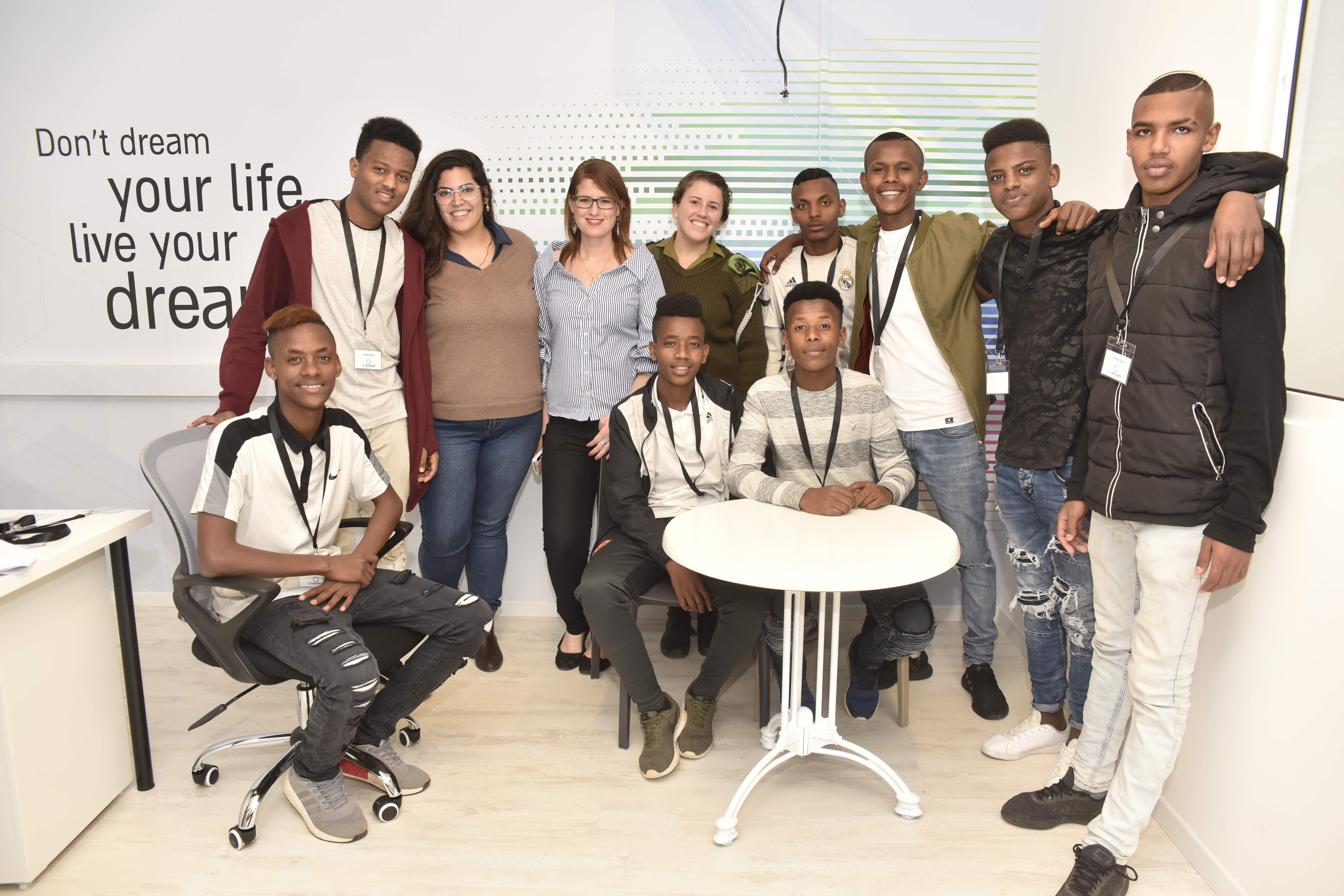 יזמות משנה חיים